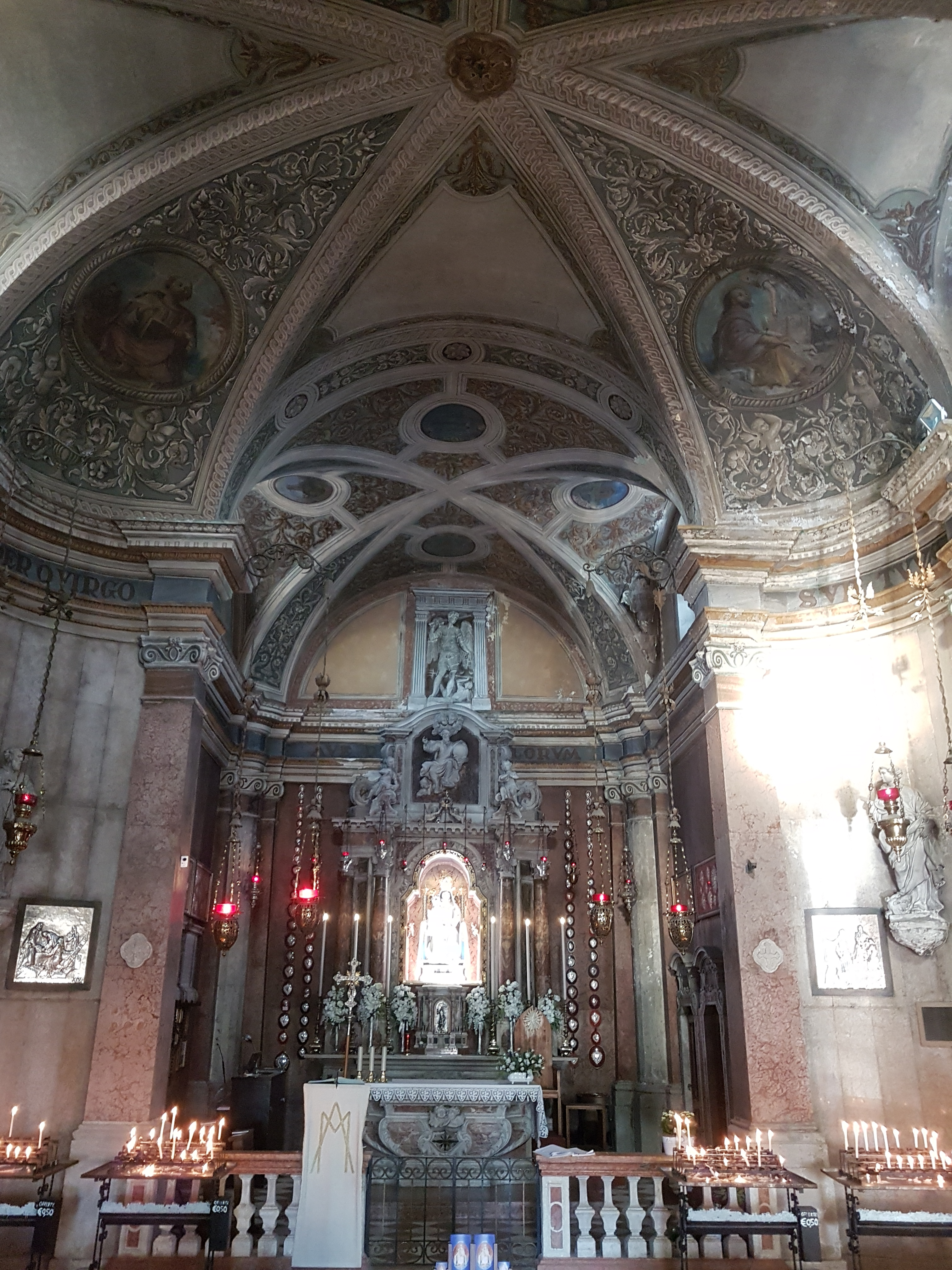 Santuario della Madonna dell'Angelo (Caorle)